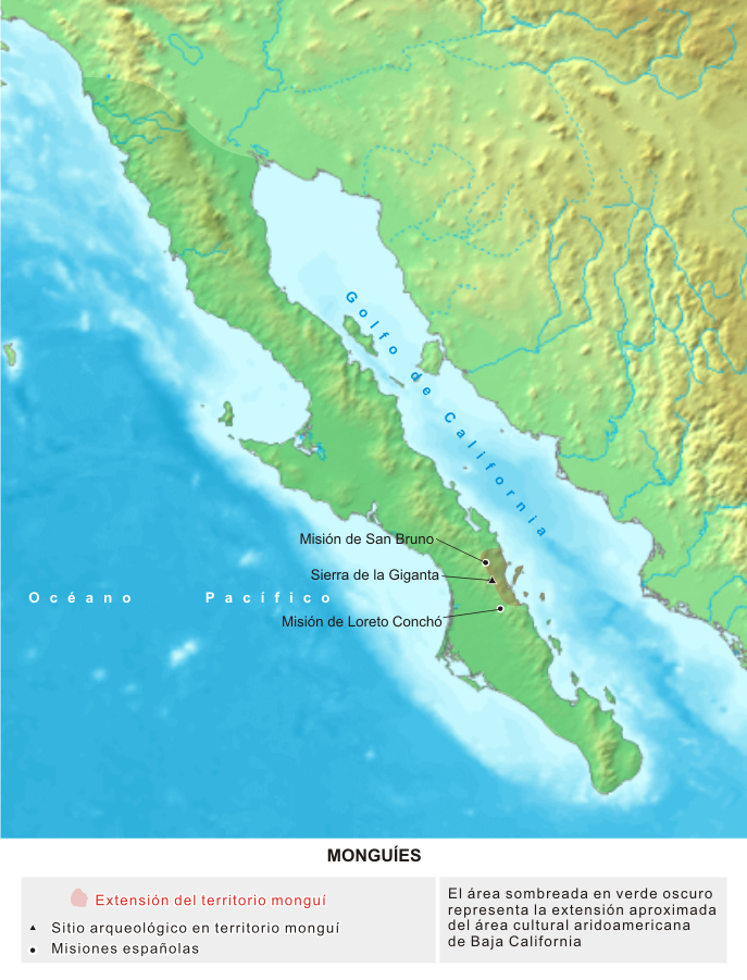 Mapa del territorio del pueblo monguí, que vivió en Baja California Sur (México), hasta el siglo XVIII